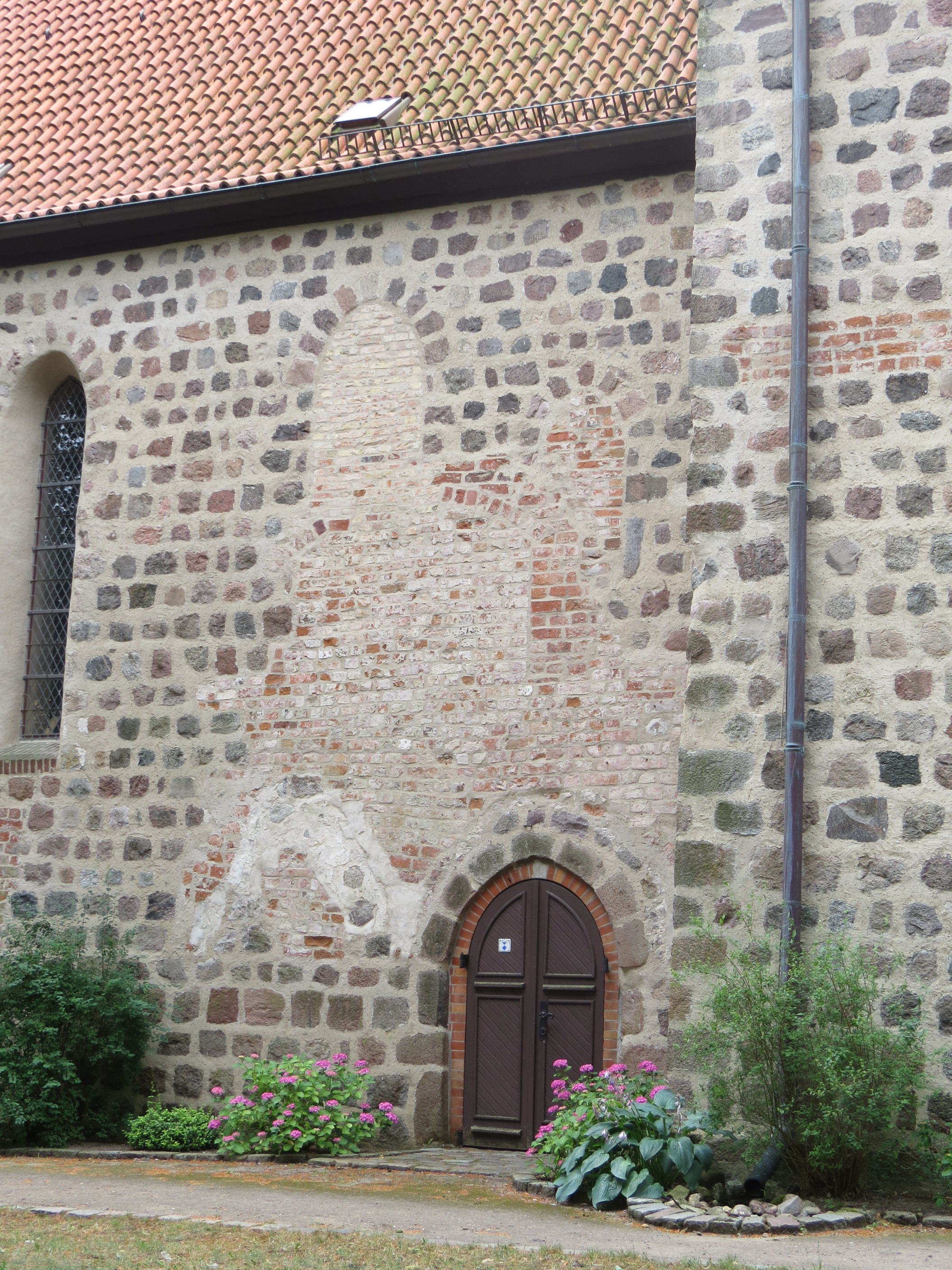 Geschichtsspuren am Bauwerk